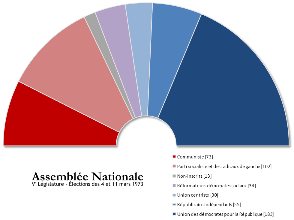 Assemblée Nationale française issue des élections de mars 1973